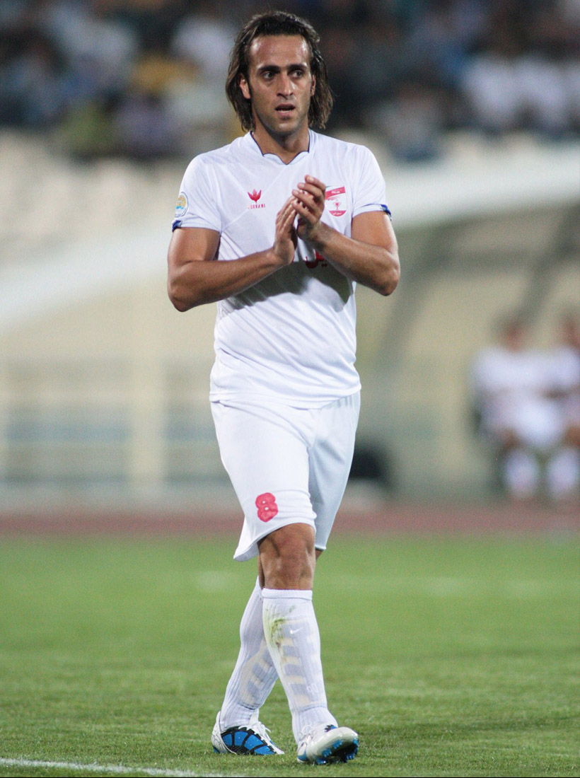 Ali karimi- during the Iran Pro League match between Steel Azin vs Esteghlal F.C